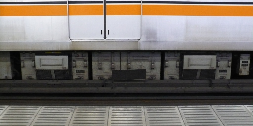 01系の電機子チョッパ装置